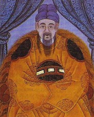 고려 공민왕 영정(민화), King Kongmin of Koryo